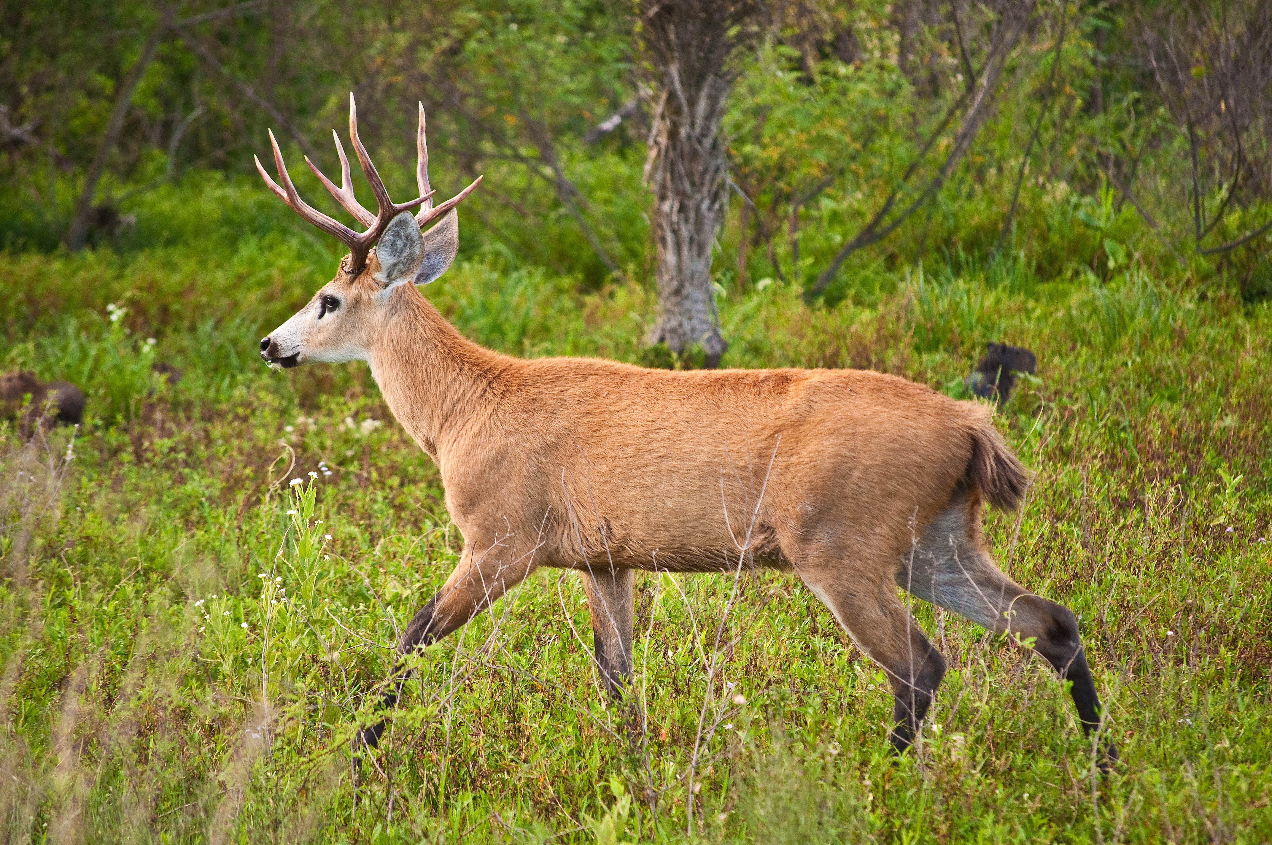 Marsh Deer, Esteros Del Ibera, Corrientes, Argentina, 3rd. Jan. 2011